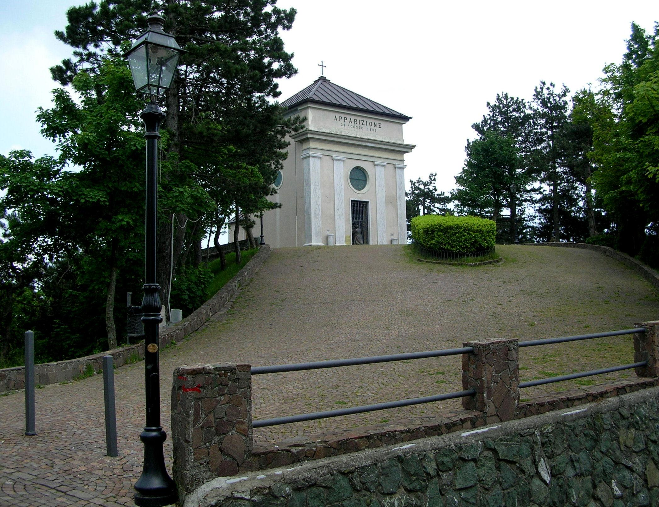 Foto propria Giugno 2008 Cappella dell'Apparizione presso il Santuario della Guardia (Ceranesi)